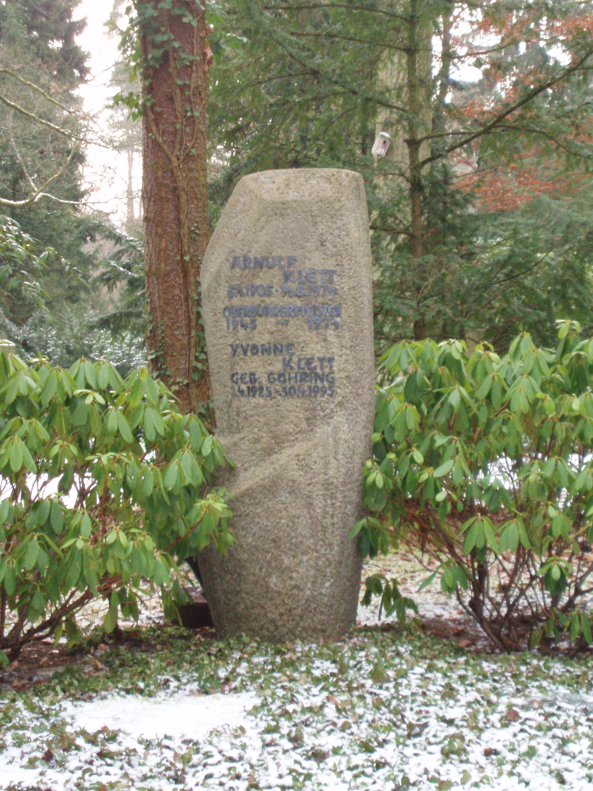 Arnulf Kletts Grab, Waldfriedhof Stuttgart